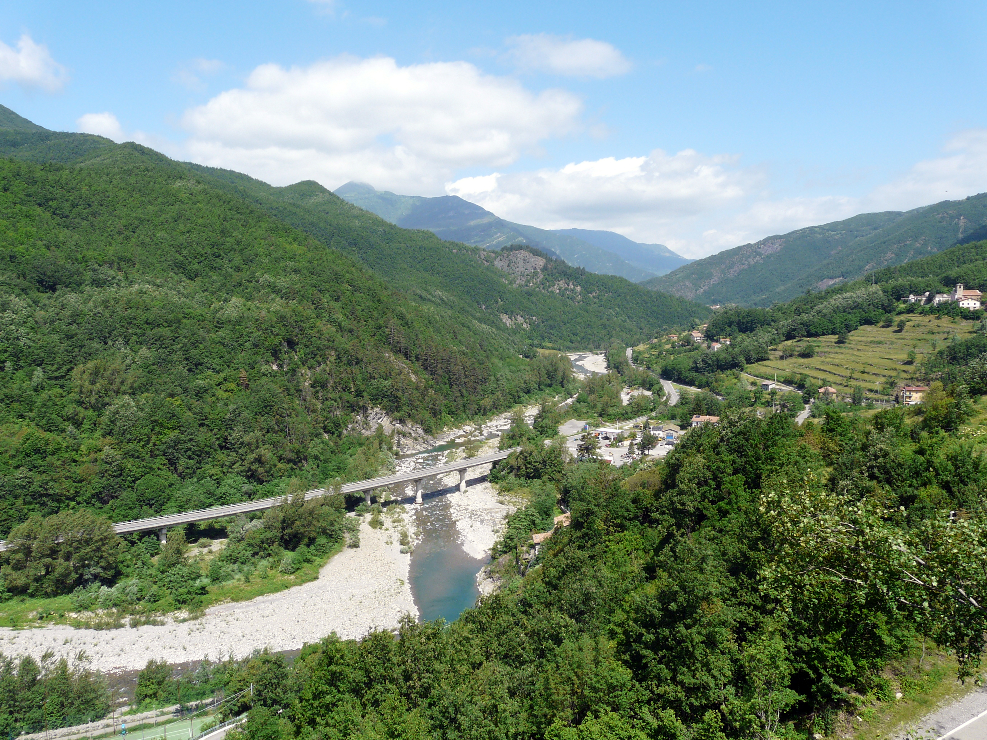 Panorama del fiume Trebbia nel territorio di Ottone, Emilia-Romagna, Italia